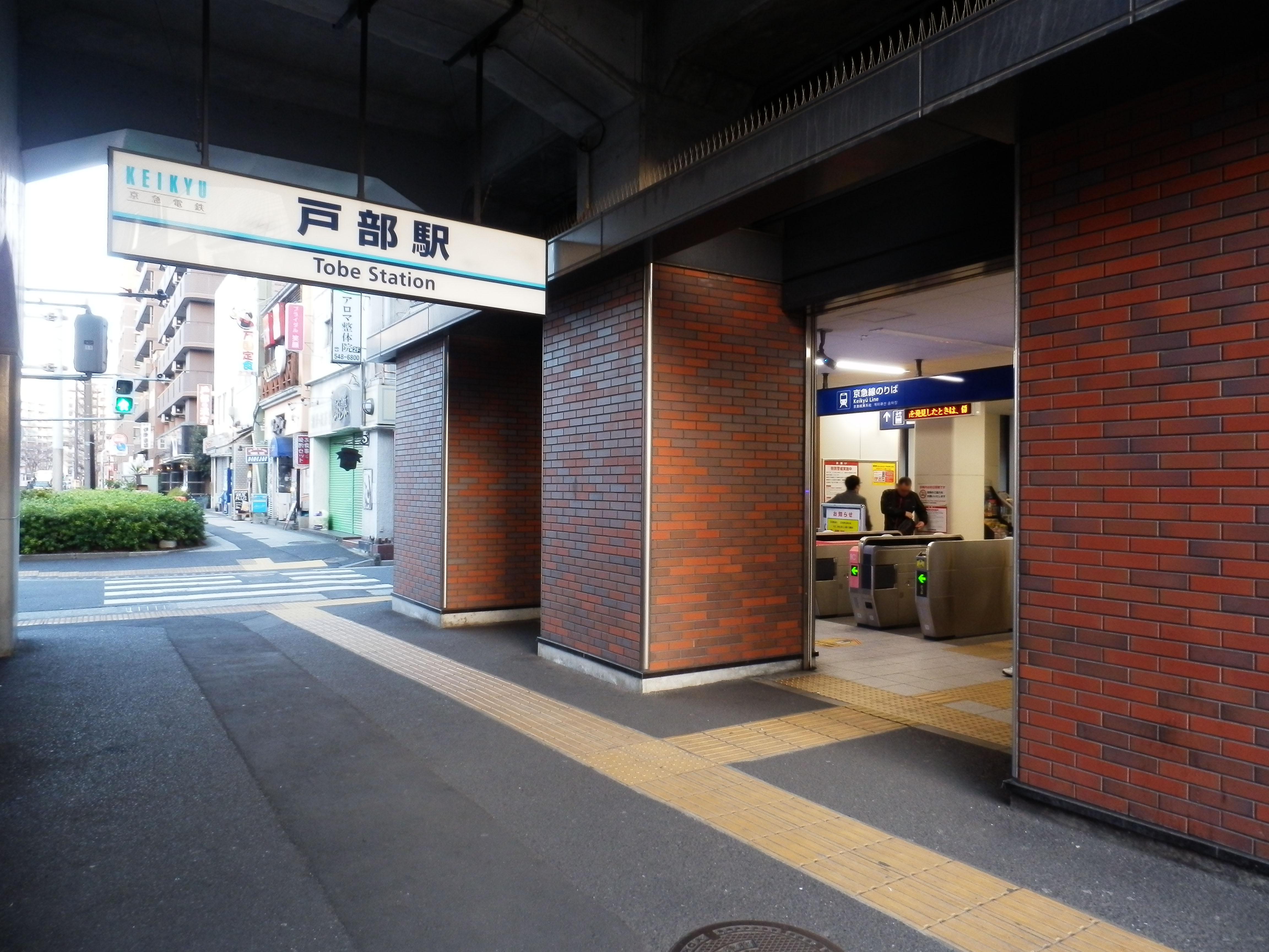 戸部駅入口